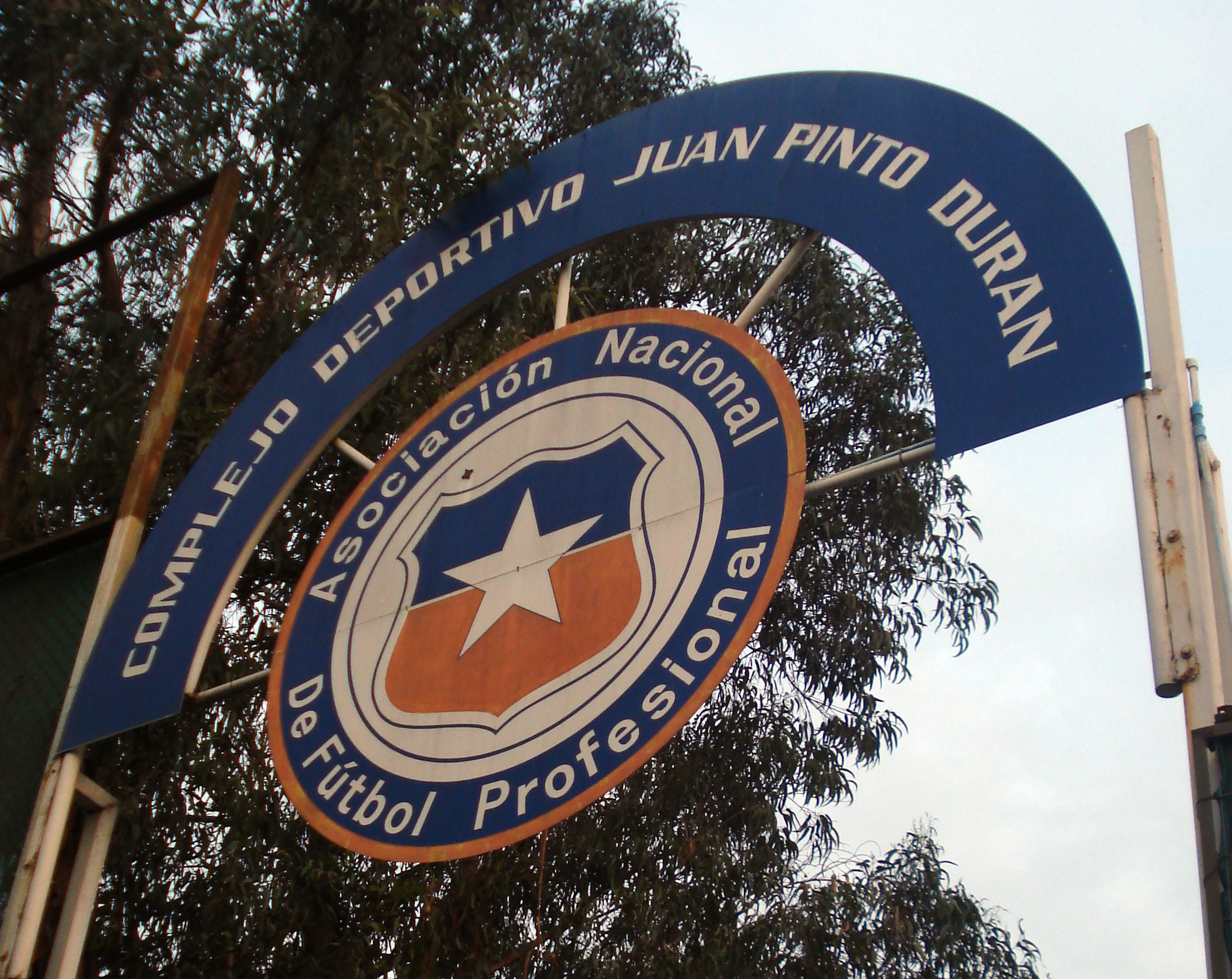 El Complejo Deportivo Juan Pinto Durán es el centro de entrenamiento y concentración de la Selección de fútbol de Chile. Esta ubicado en la comuna de Macul en la intersección de la Avenidas Macul con Las Torres.